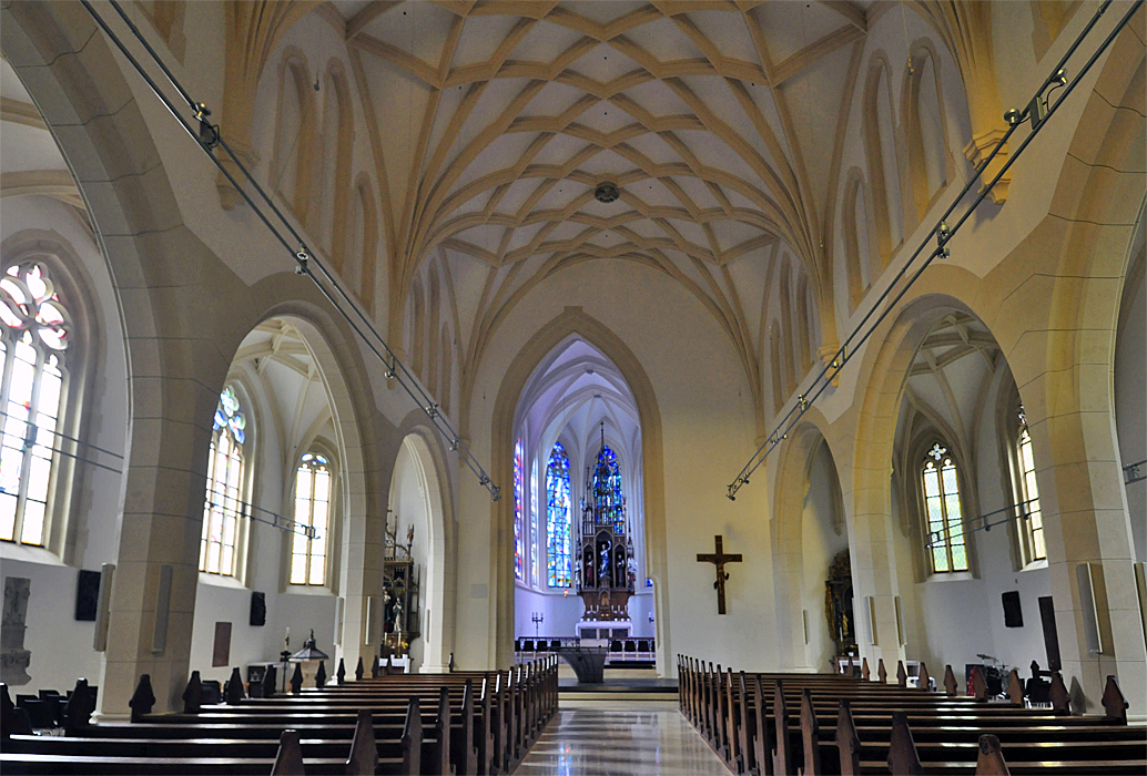 Pfarrkirche St. Michael in Heiligenstadt, Wien